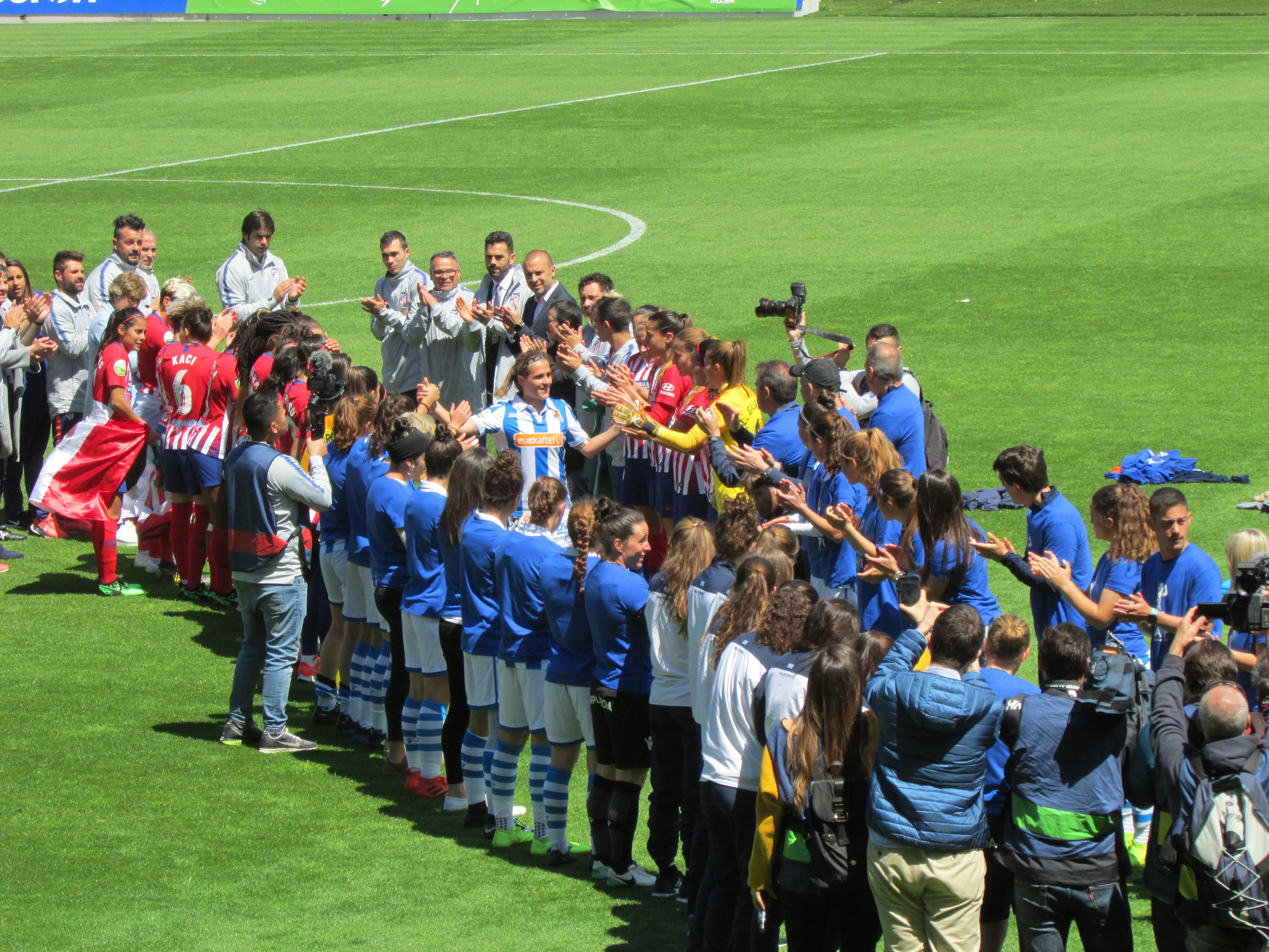 Despedida de la futbolista Sandra Ramajo